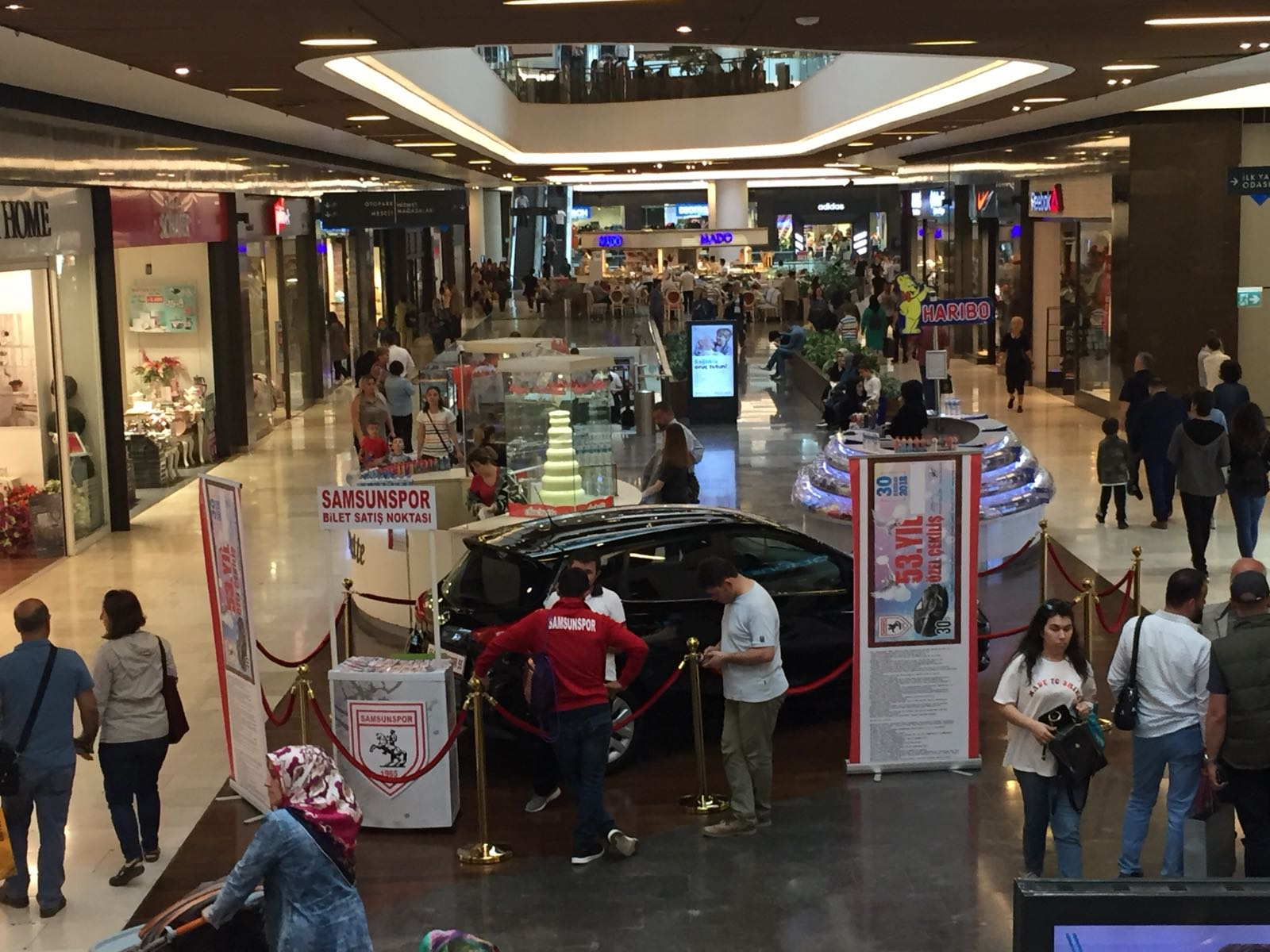 Samsunspor 53. Yıl Özel Çekilişi için Piazza AVM'de oluşturulan bilet satış noktasından bir görünüm.